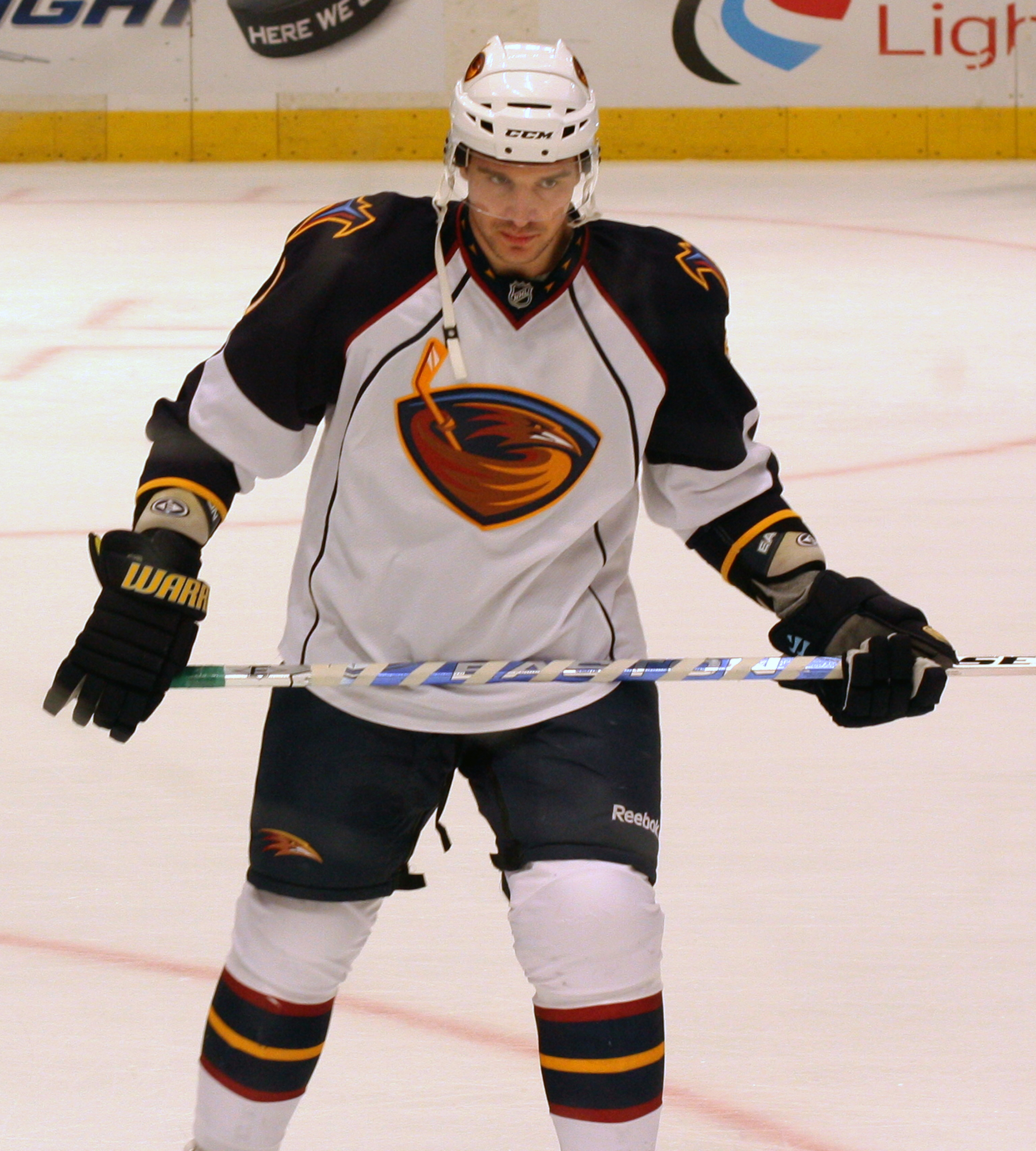 Zubarev in April 2011.